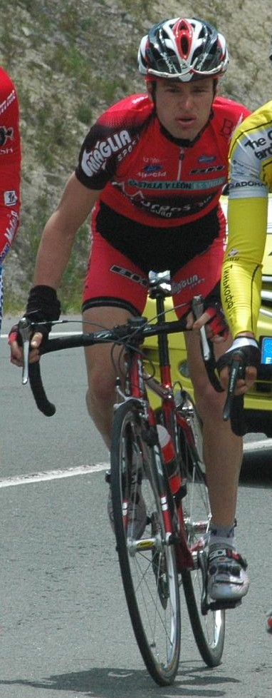 Oscar Pujol (Burgos). Euskal Bizikleta 2008, stage 2, escape.